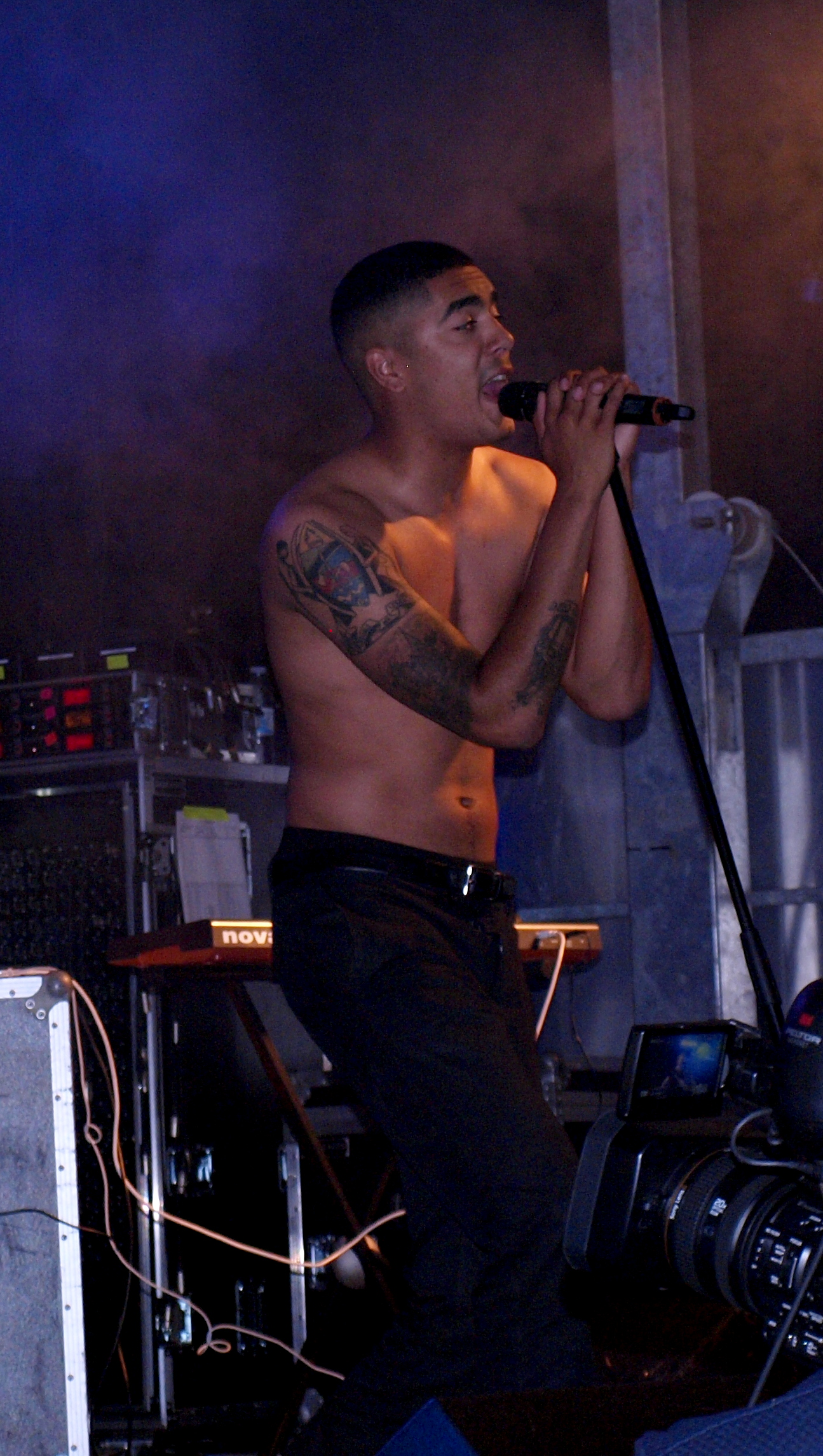 Kesi, dansk rap musiker, Kolding kulturnat 21. august 2015